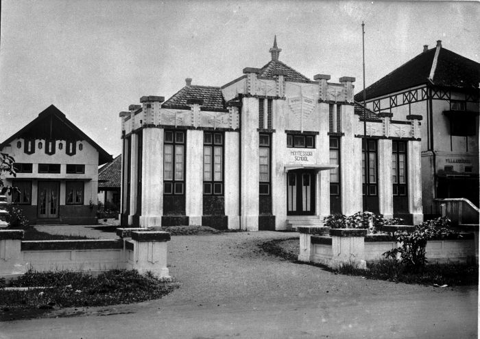 Foto. Gebouw van de Montessorischool te Malang.